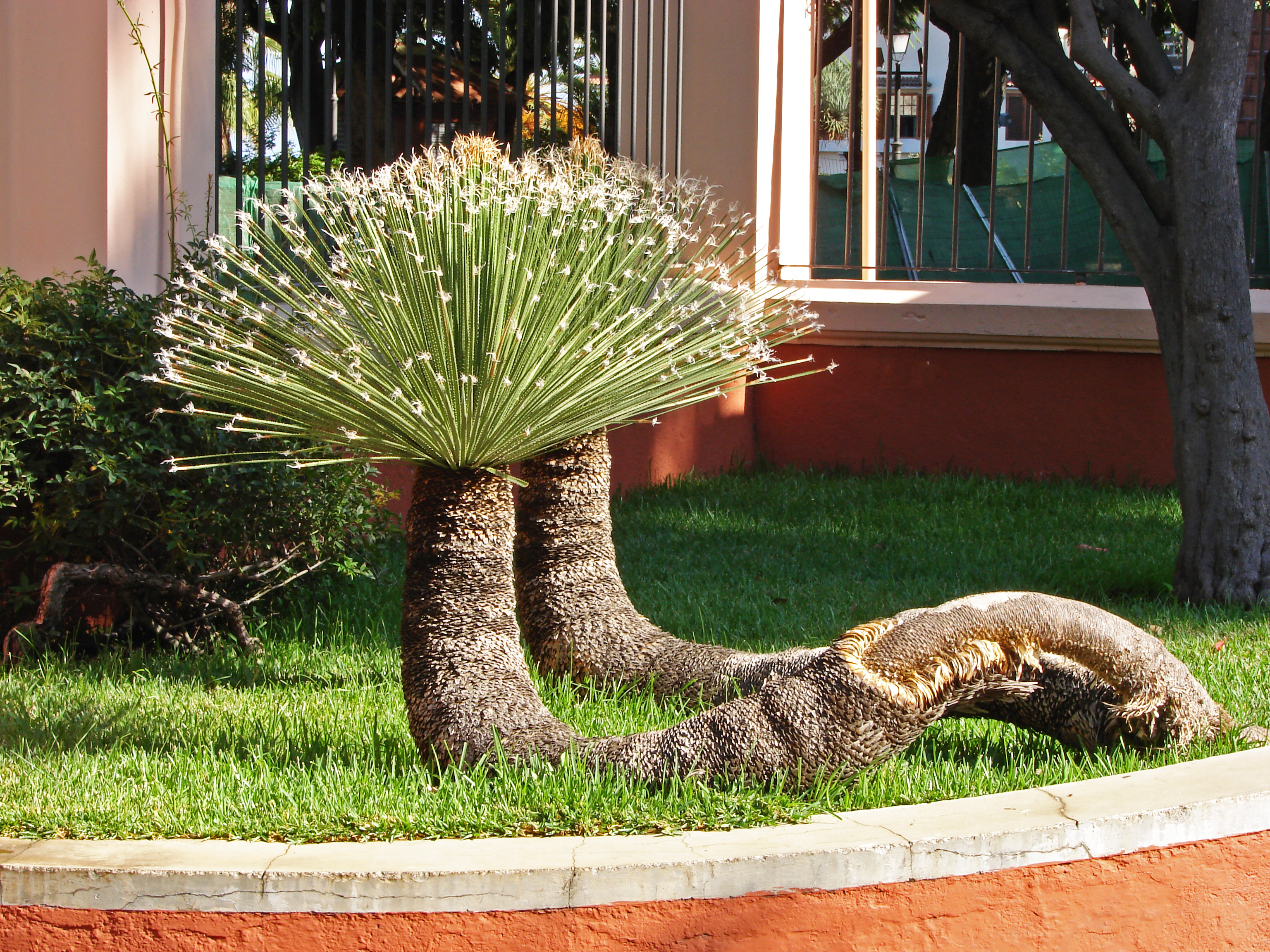 Ganze Pflanze